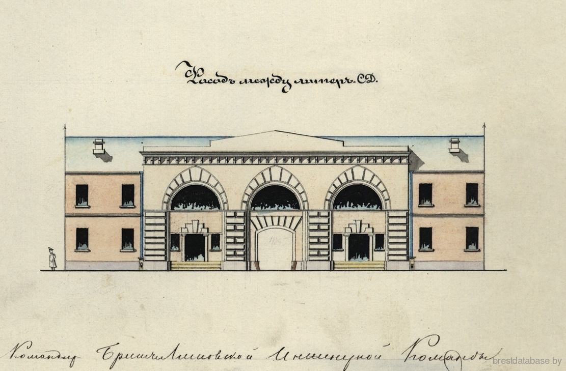 Фрагмент дэтальнага чарцяжа Кобрынскай брамы да Атласа, 1861 г. З архіва РДВГА, ф.349.оп.4 д.1094-2